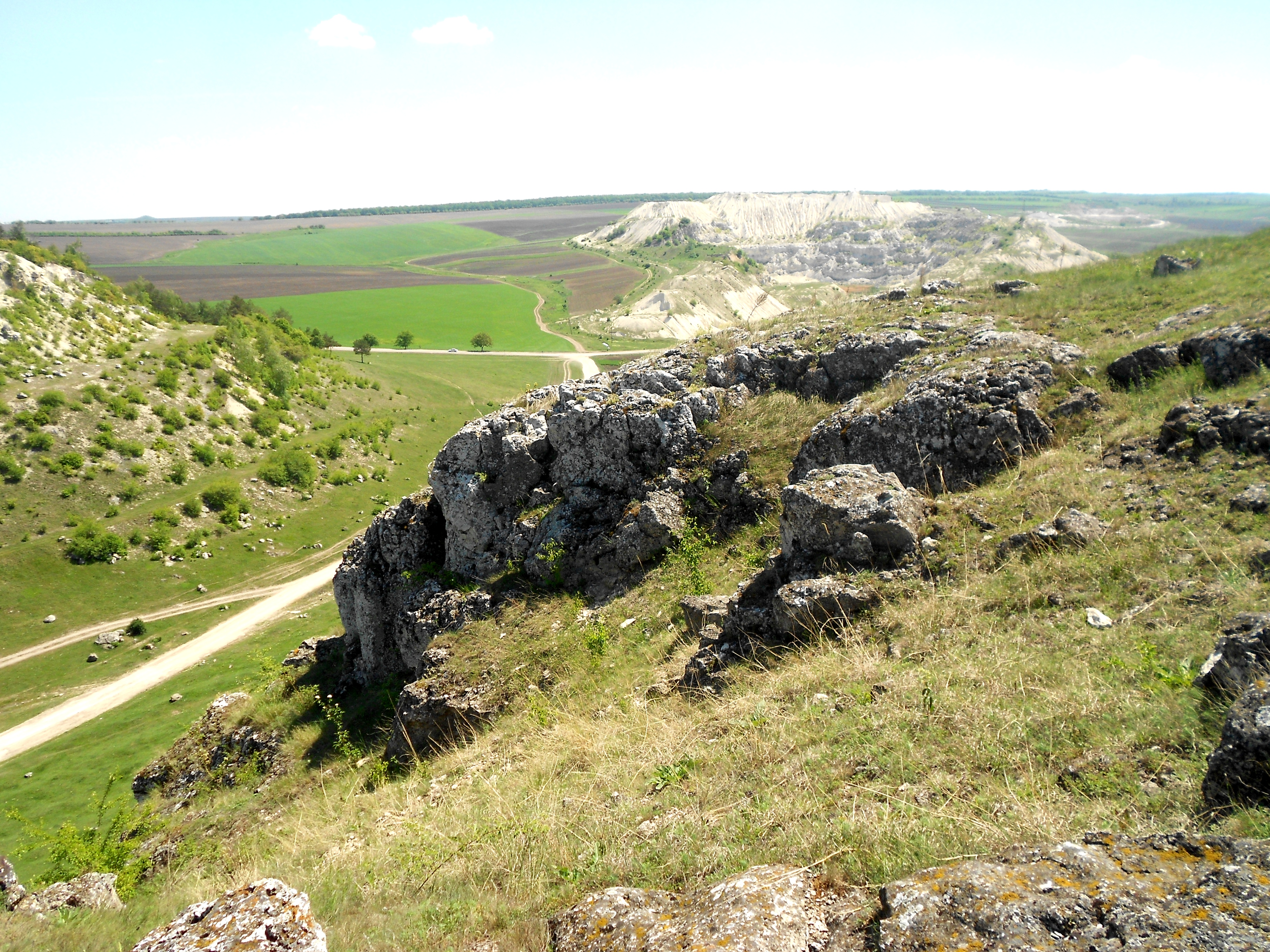 Toltre în apropiere de s. Fetești, r. Edineț